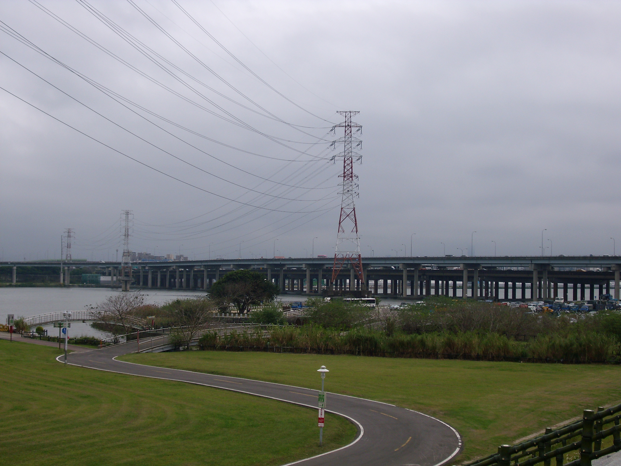 Bân-lâm-gú: 予汐止五股高架橋夾咧的中山高速公路淡水河橋，佇新北市這爿翕的。